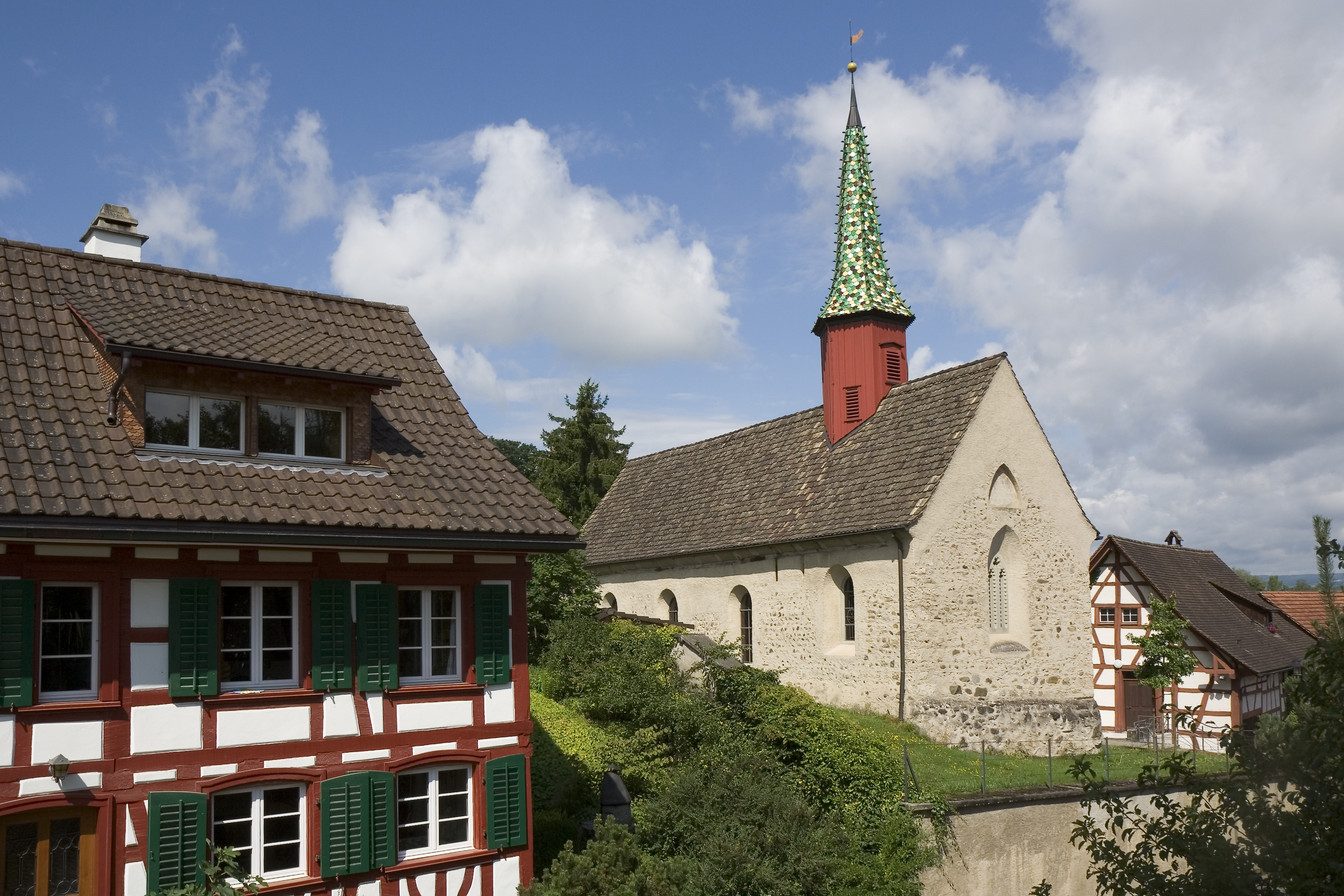 Die Kirche von Schlattingen von Südosten gesehen